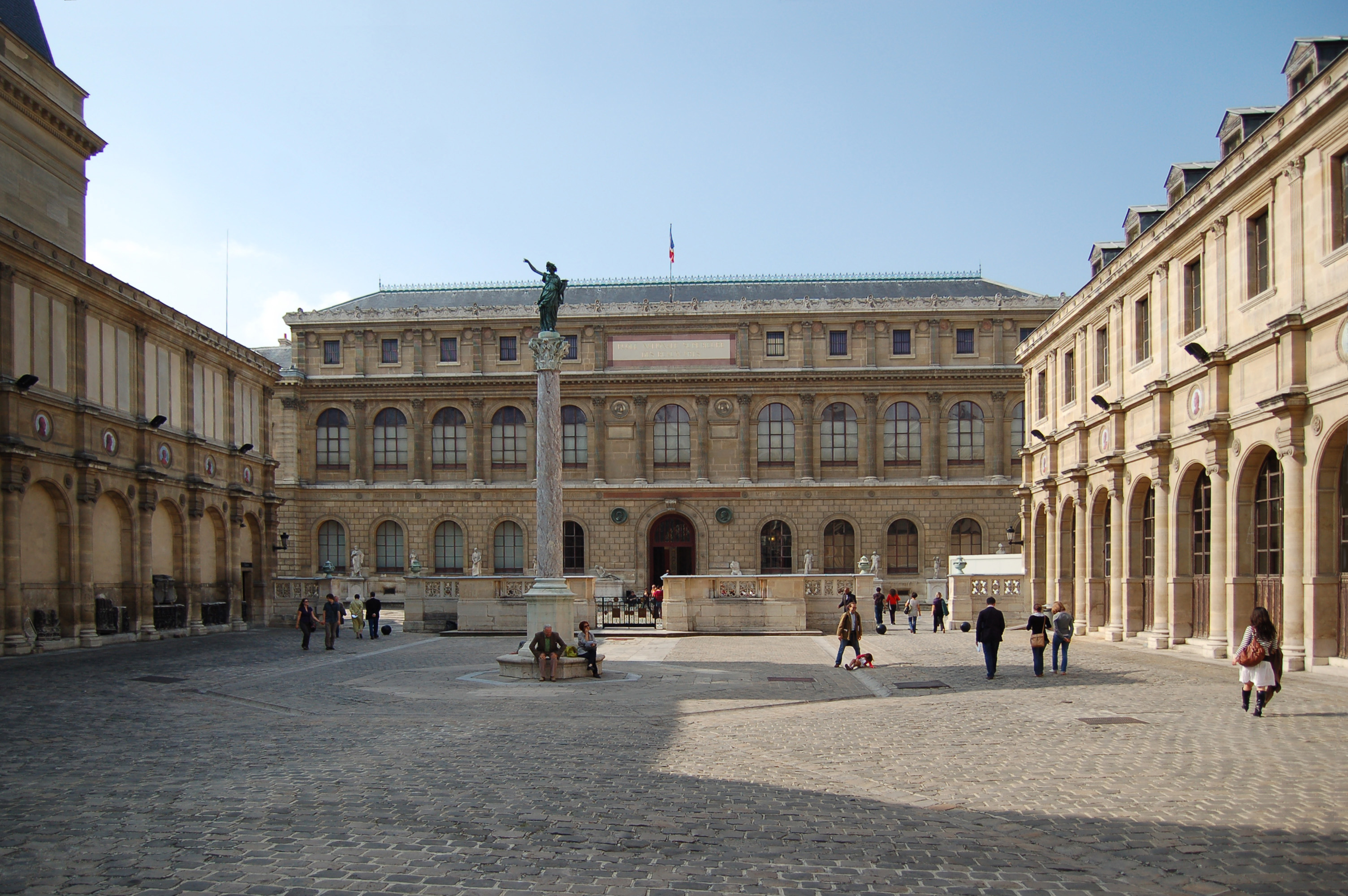 La cour d'honneur de l'École Nationale Supérieure des Beaux-Arts, au fond : le Palais des Études.